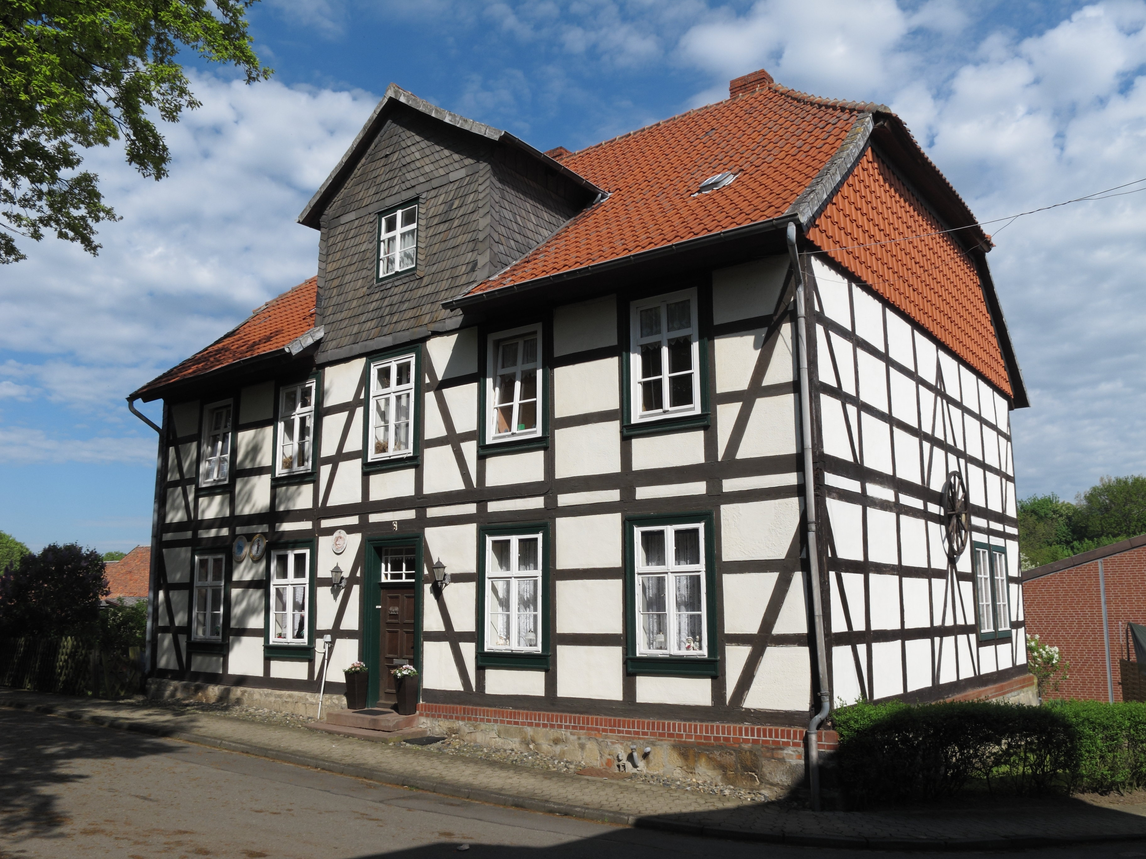 Achim, Ortsteil von Börßum, Fachwerkhaus